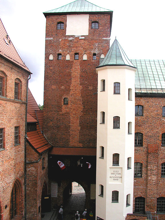 Zamek Książąt Pomorskich w Darłowie-dziedziniec